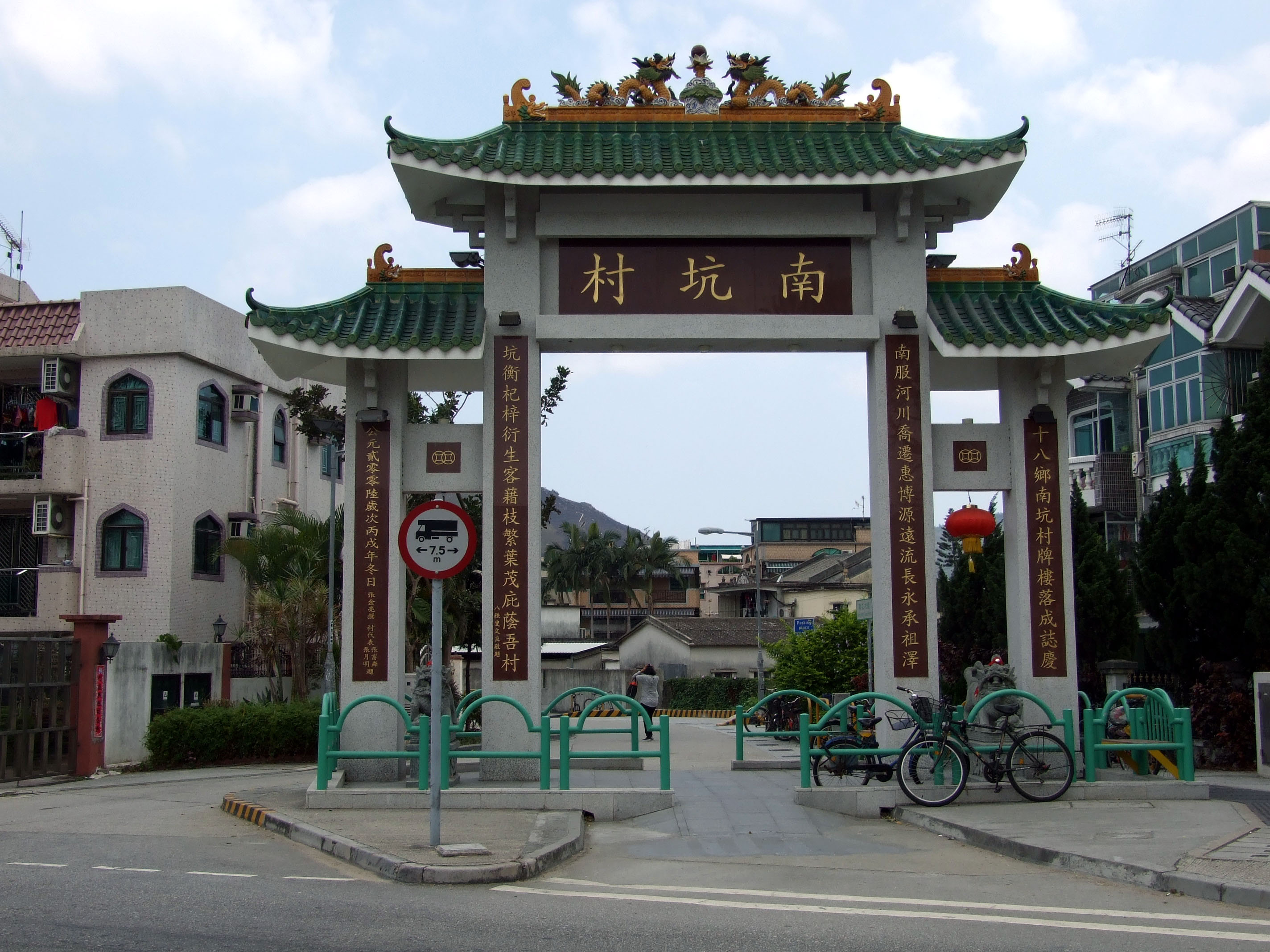 中文（香港）: 南坑村牌樓